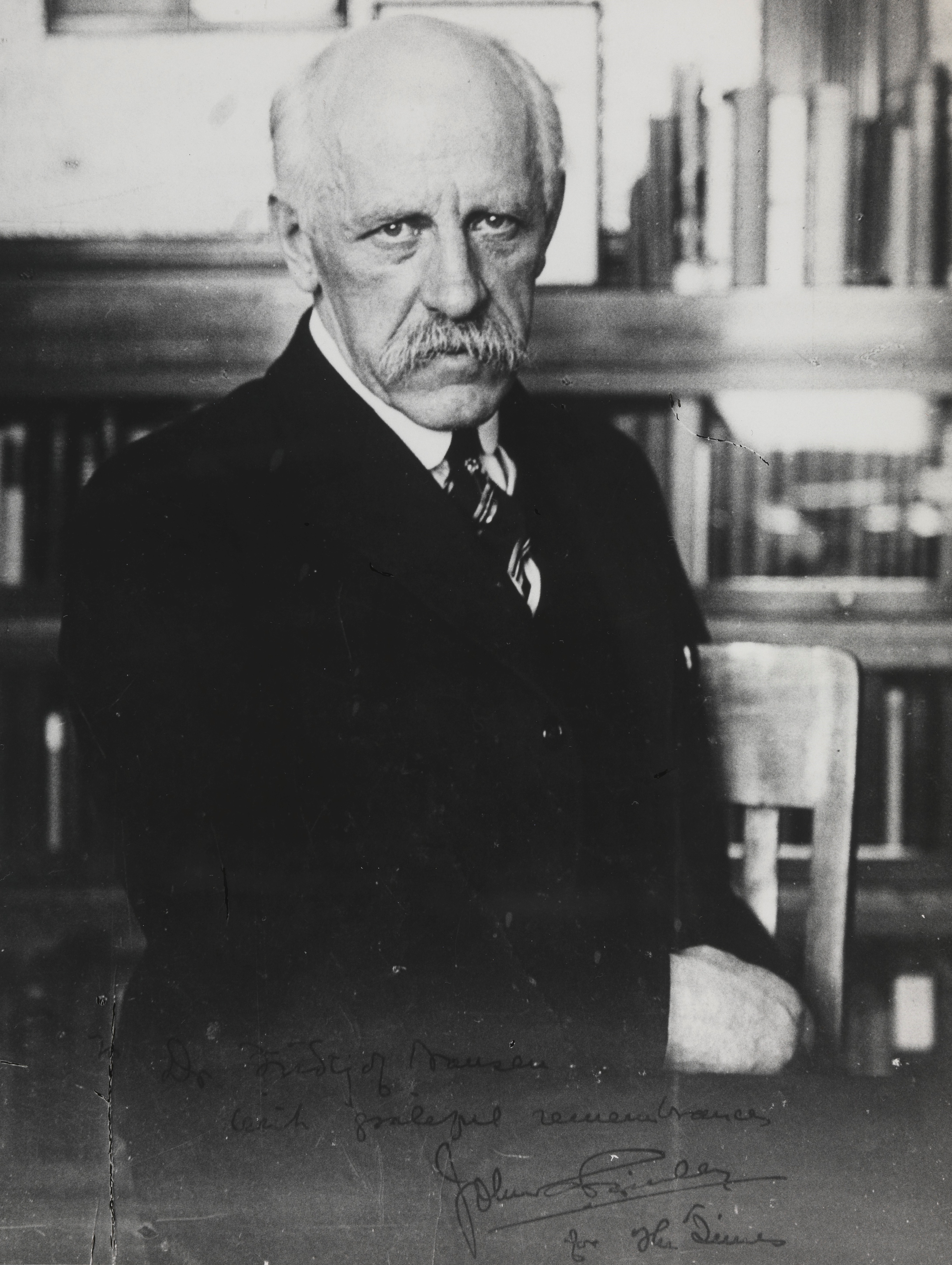 Fridtjof Nansen under et besøk i USA. Depicted person: Nansen, Fridtjof (1861-1930) Depicted place: USA, New York